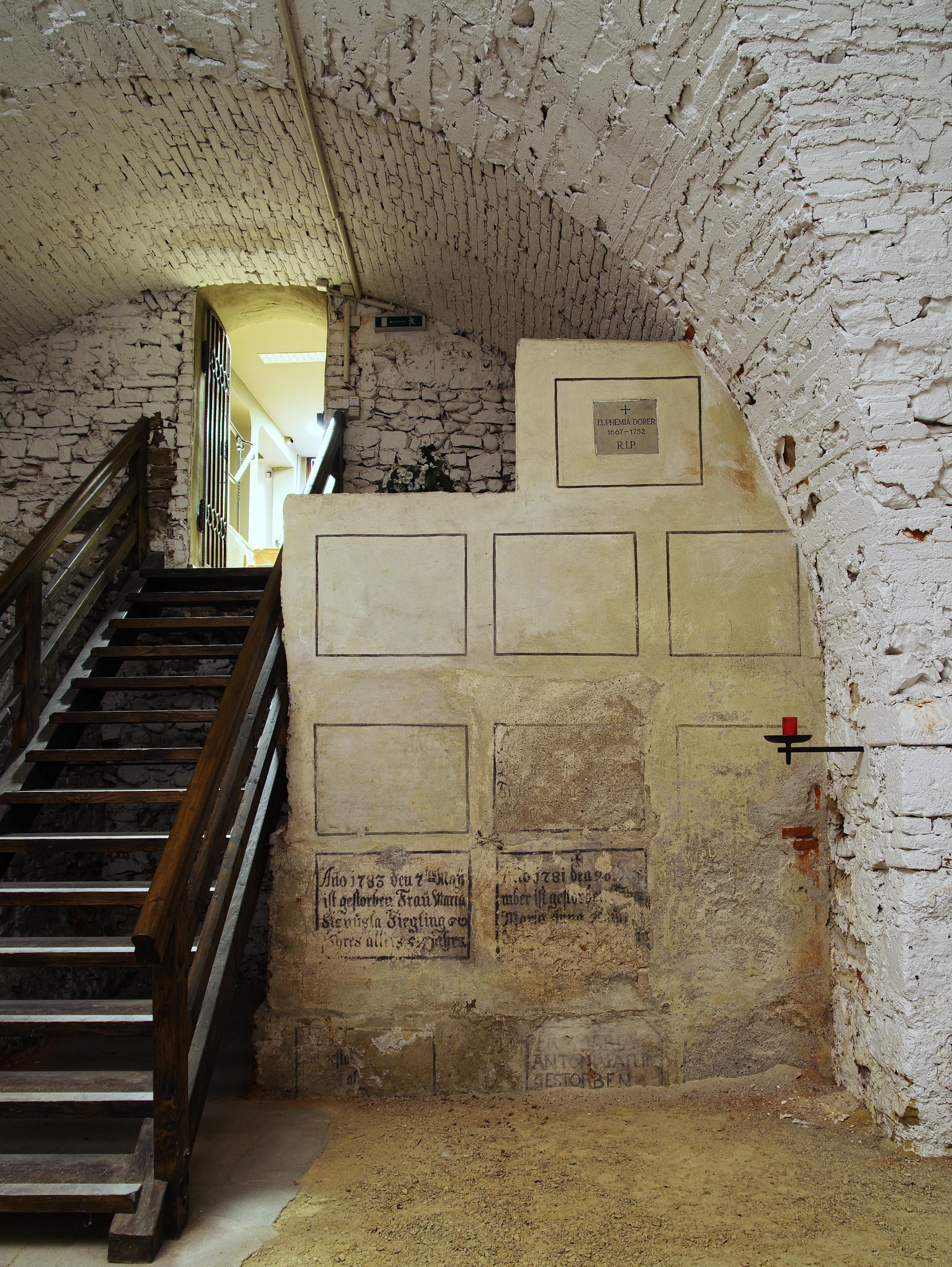 Grablegen der Ursulinennonnen, Rechts oben das Grab der Euphemia Dorer